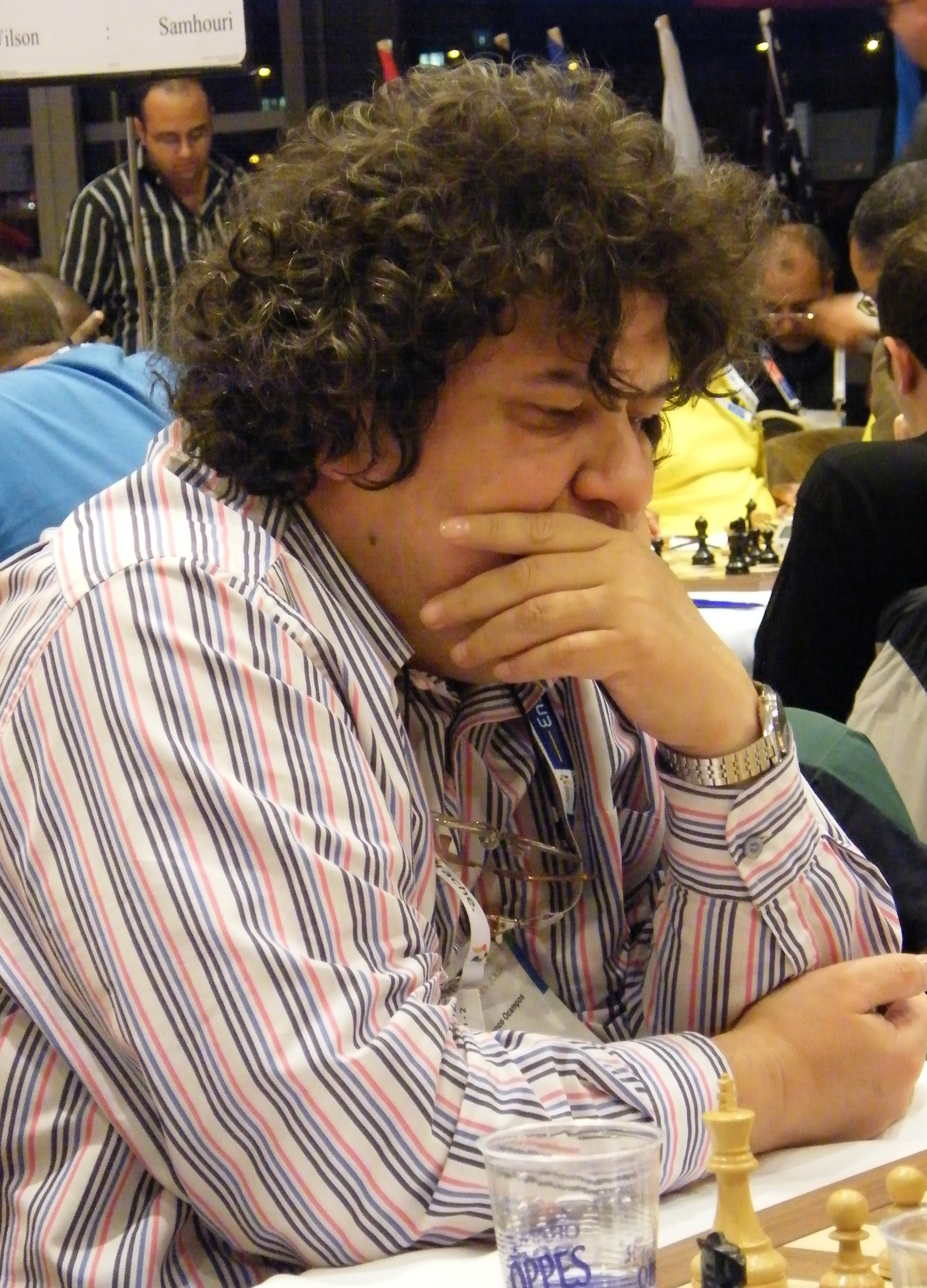 GM Zenon Franco Ocampos bei der 38. Schacholympiade in Dresden 2008